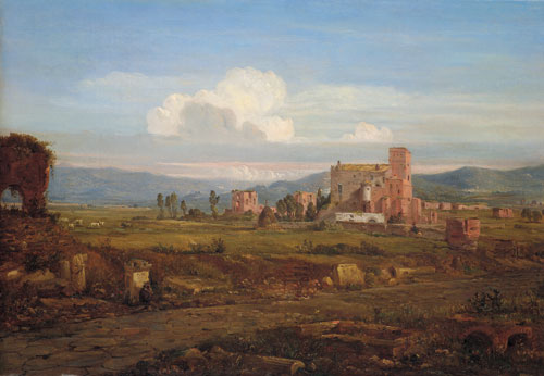 Campagnalandschaft (Via Appia)